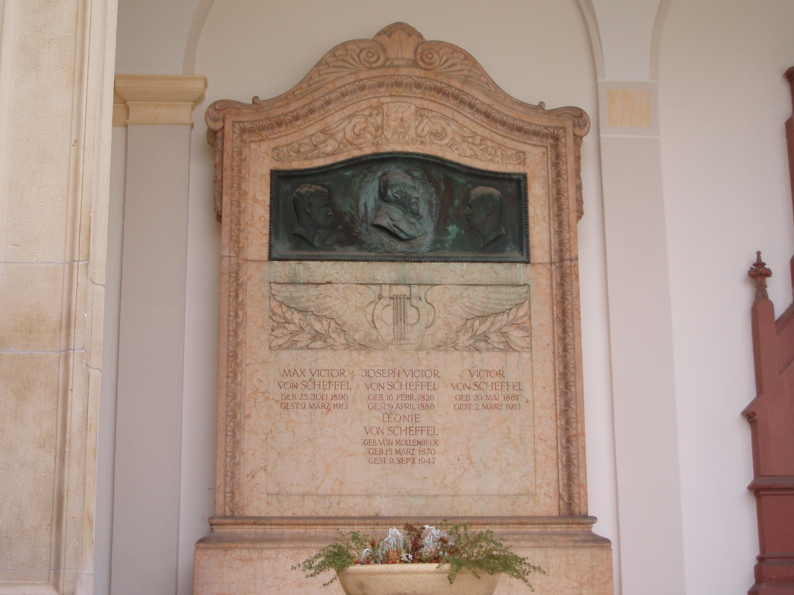 Grabmal für Familie Scheffel, erschaffen von Adolf Heer, Hauptfriedhof Karlsruhe